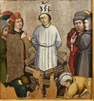 Skrzydło ołtarza z Roudník